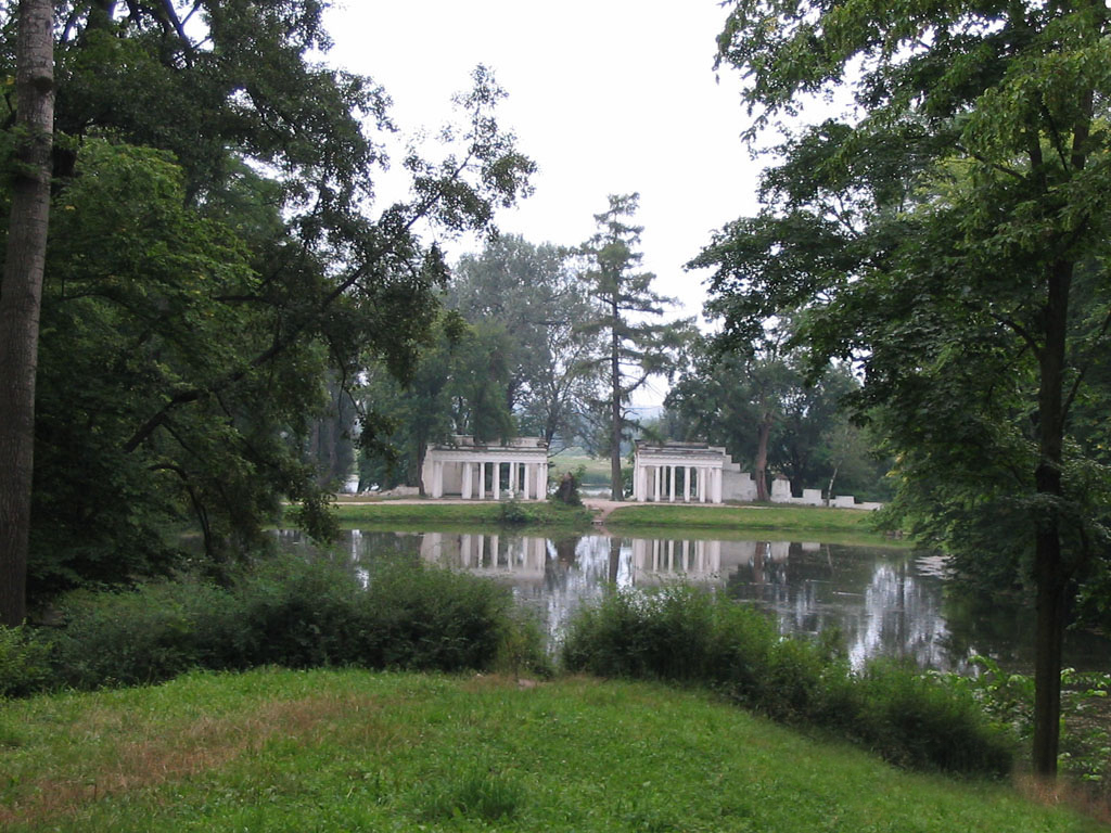 Oleksandriia Park in Bila Tserkva, Ukraine.